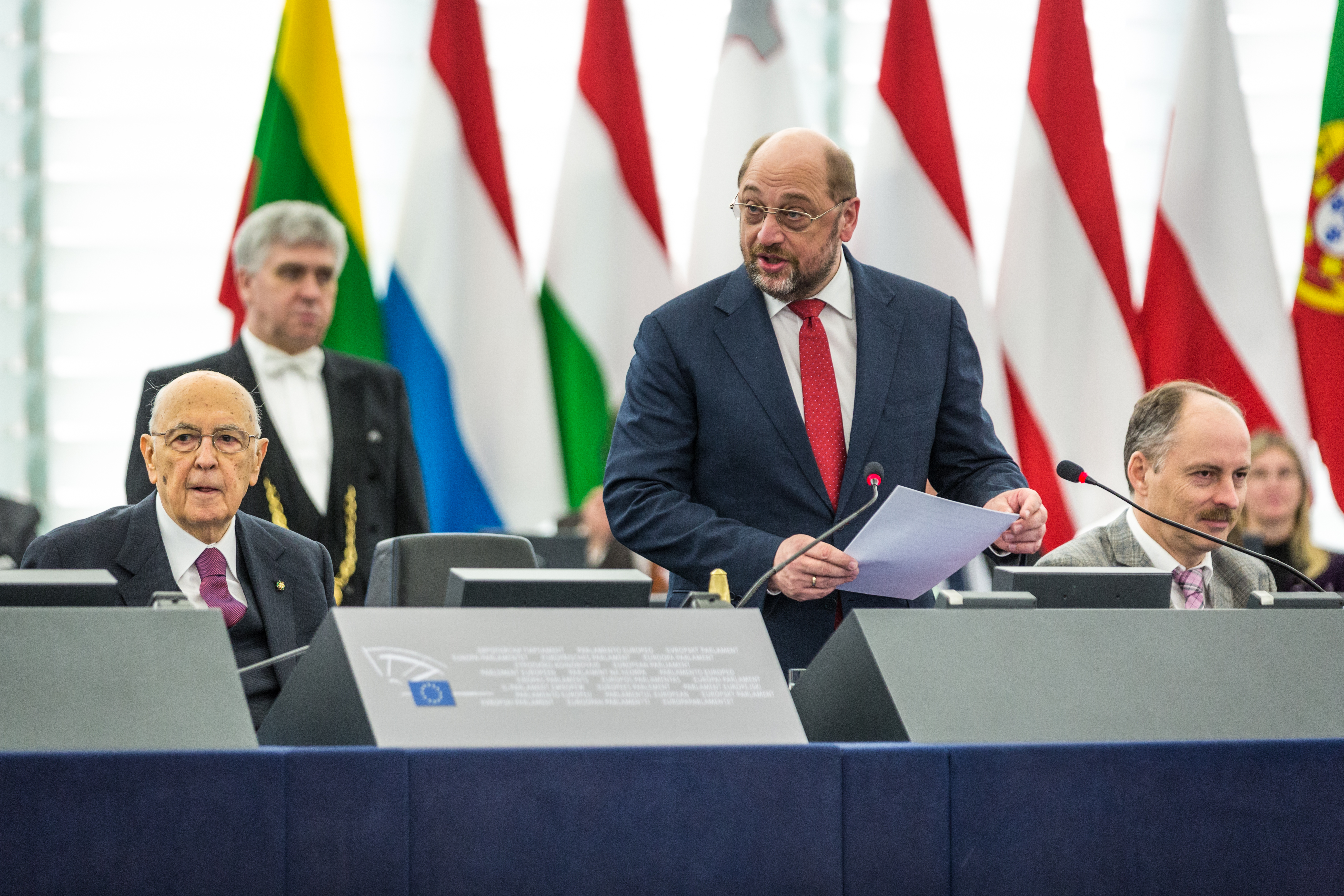 Giorgio Napolitano, président de la république italienne en visite officielle est accueilli par Martin Schulz au Parlement européen de Strasbourg 4 février 2014